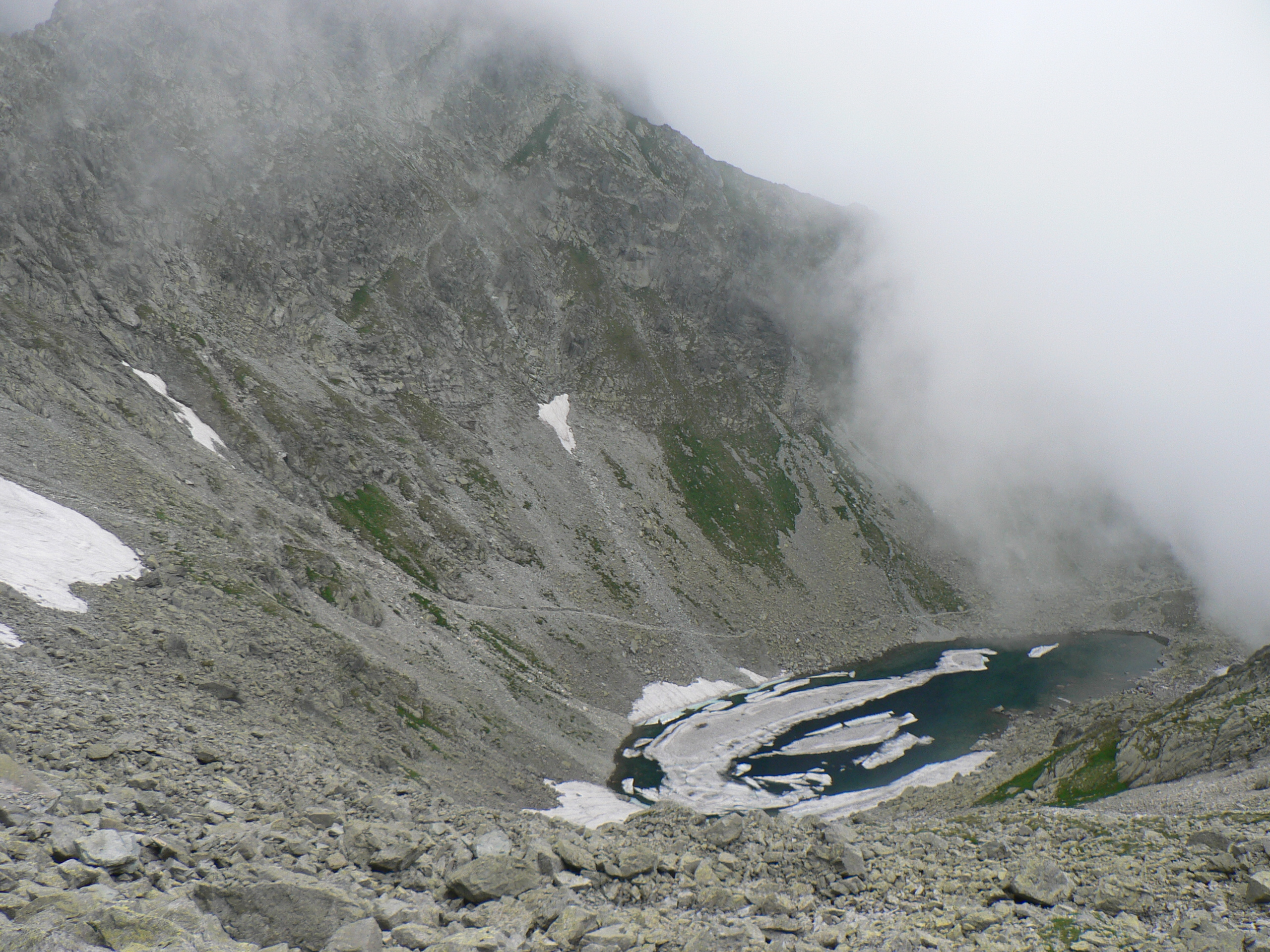 Kocioł pod Polskim Grzebieniem ze Zmarzłym Stawem